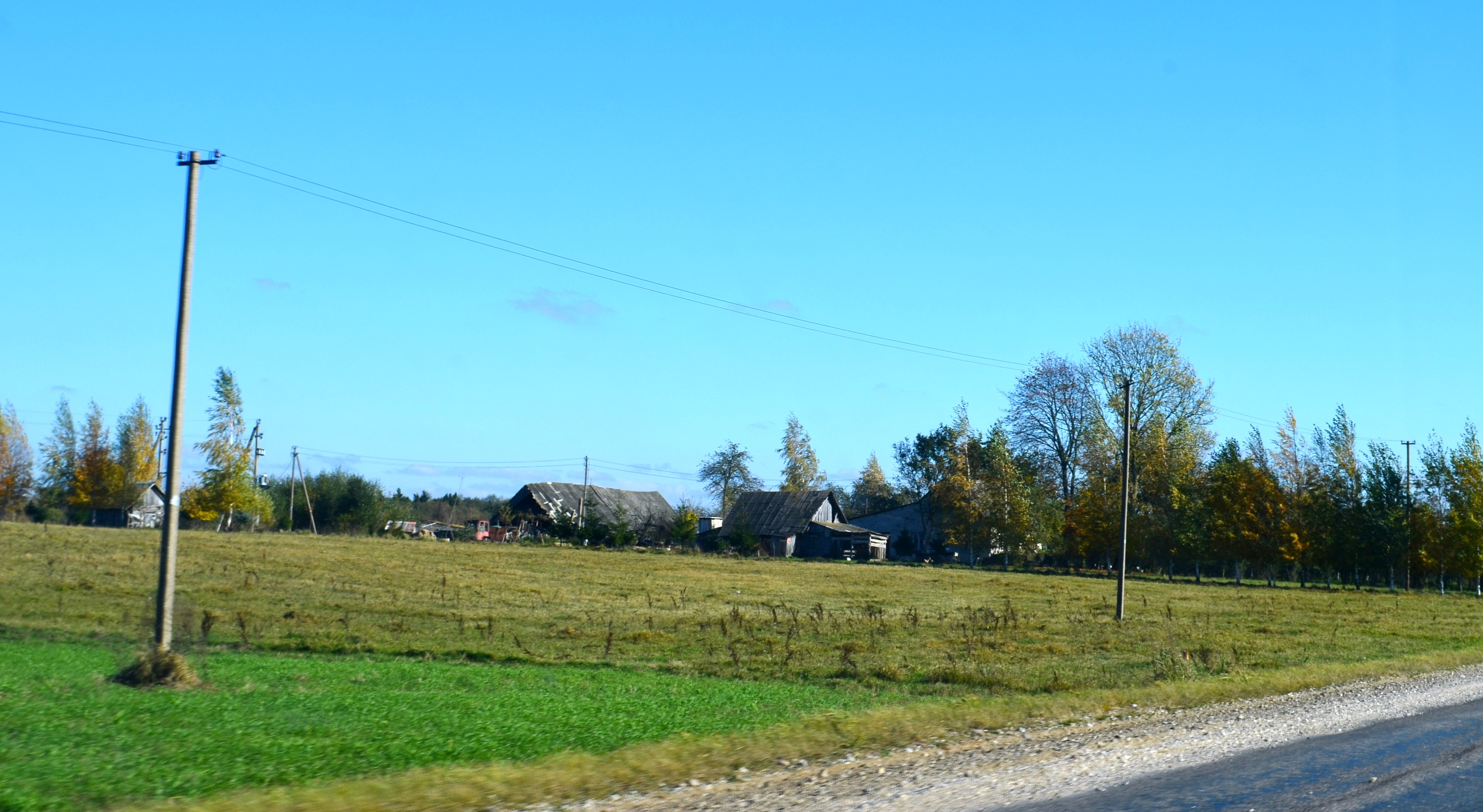 Kačėniškiai, Ukmergės r.